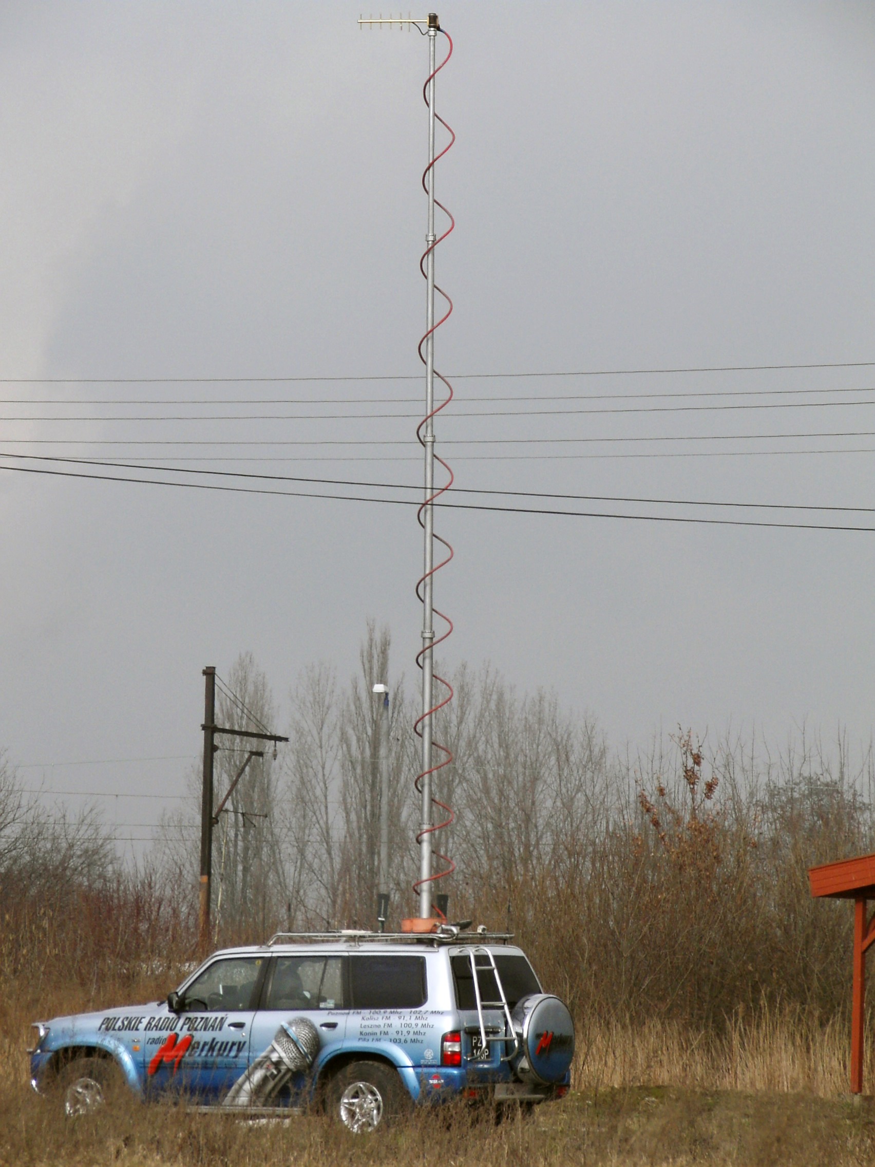 Wóz reporterski Radia Merkury w Poznaniu. Nissan Patrol